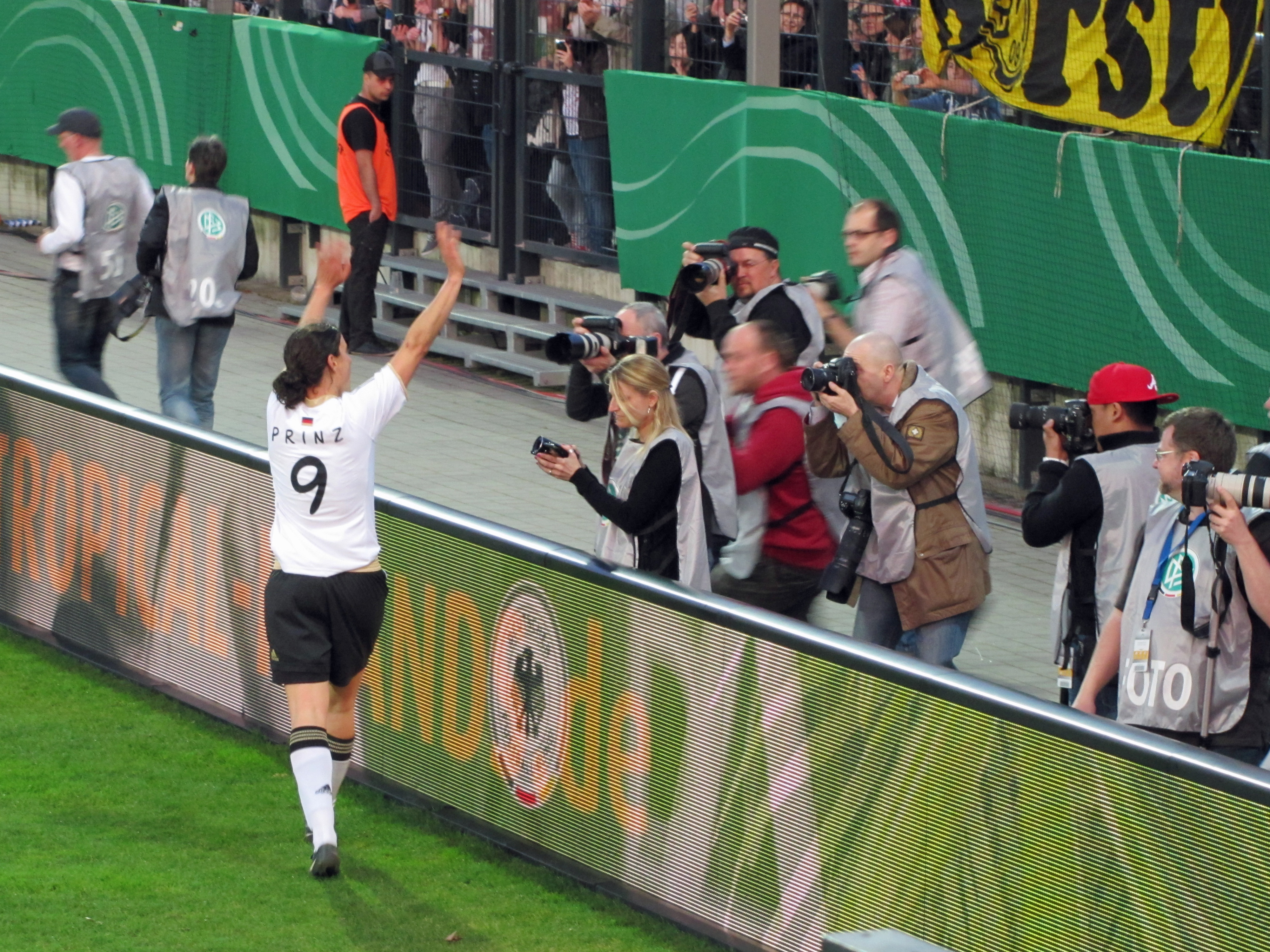 DFB-Abschiedsspiel für Birgit Prinz im Volksbank-Stadion in Ffm. Birgit Prinz auf ihrer abschliessenden Stadionrunde.